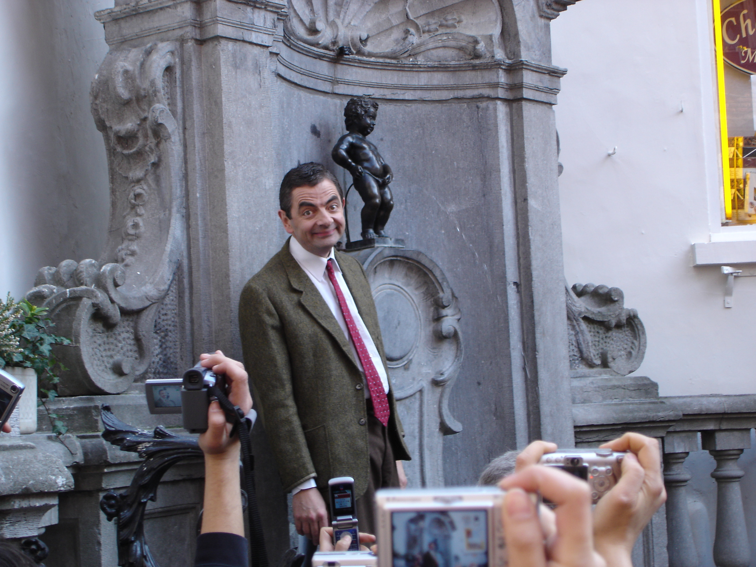 Ala, ya tenéis la foto del Manneken Pis, no me digáis que no ha salido bien :-) El vídeo .